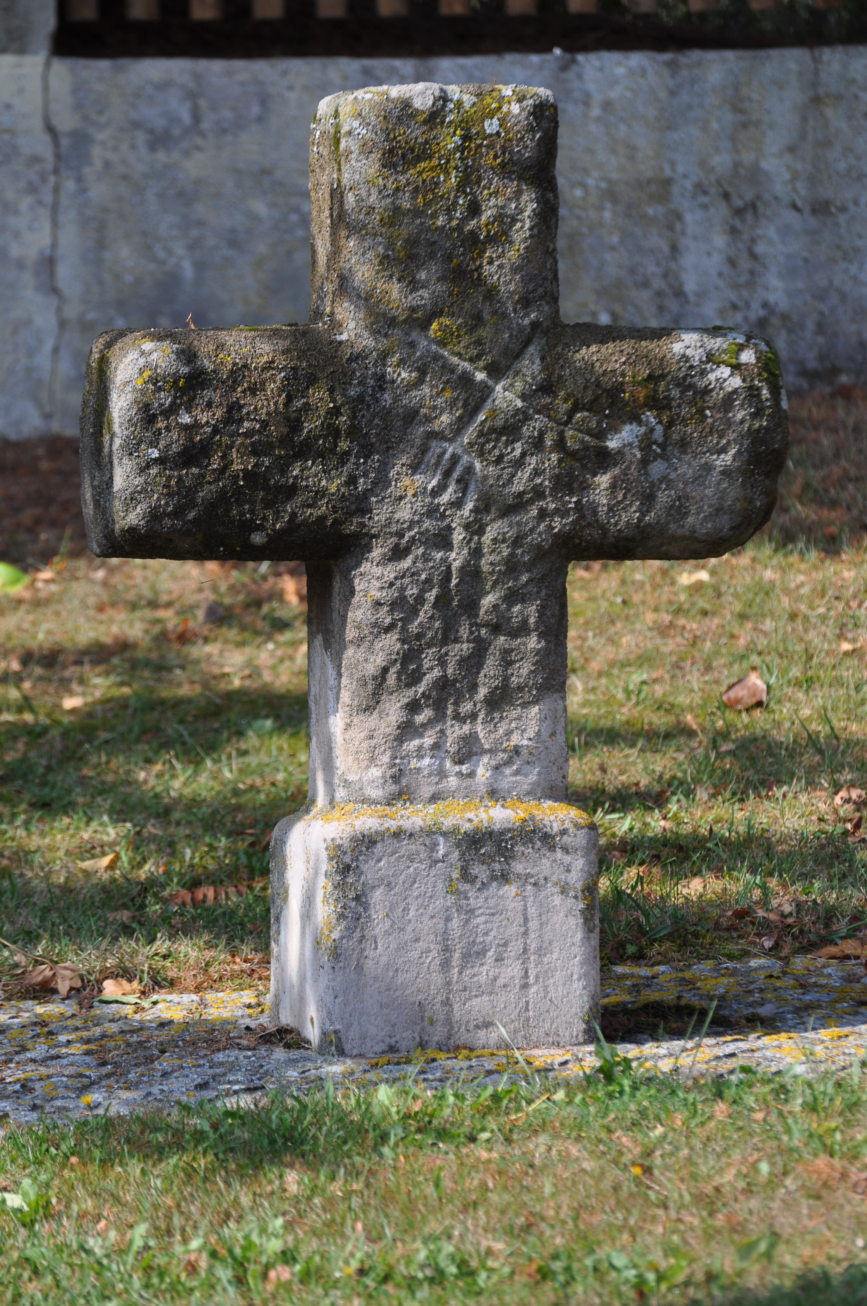 Steinkreuz, wohl 17. JahrhundertThis is a photograph of an architectural monument.